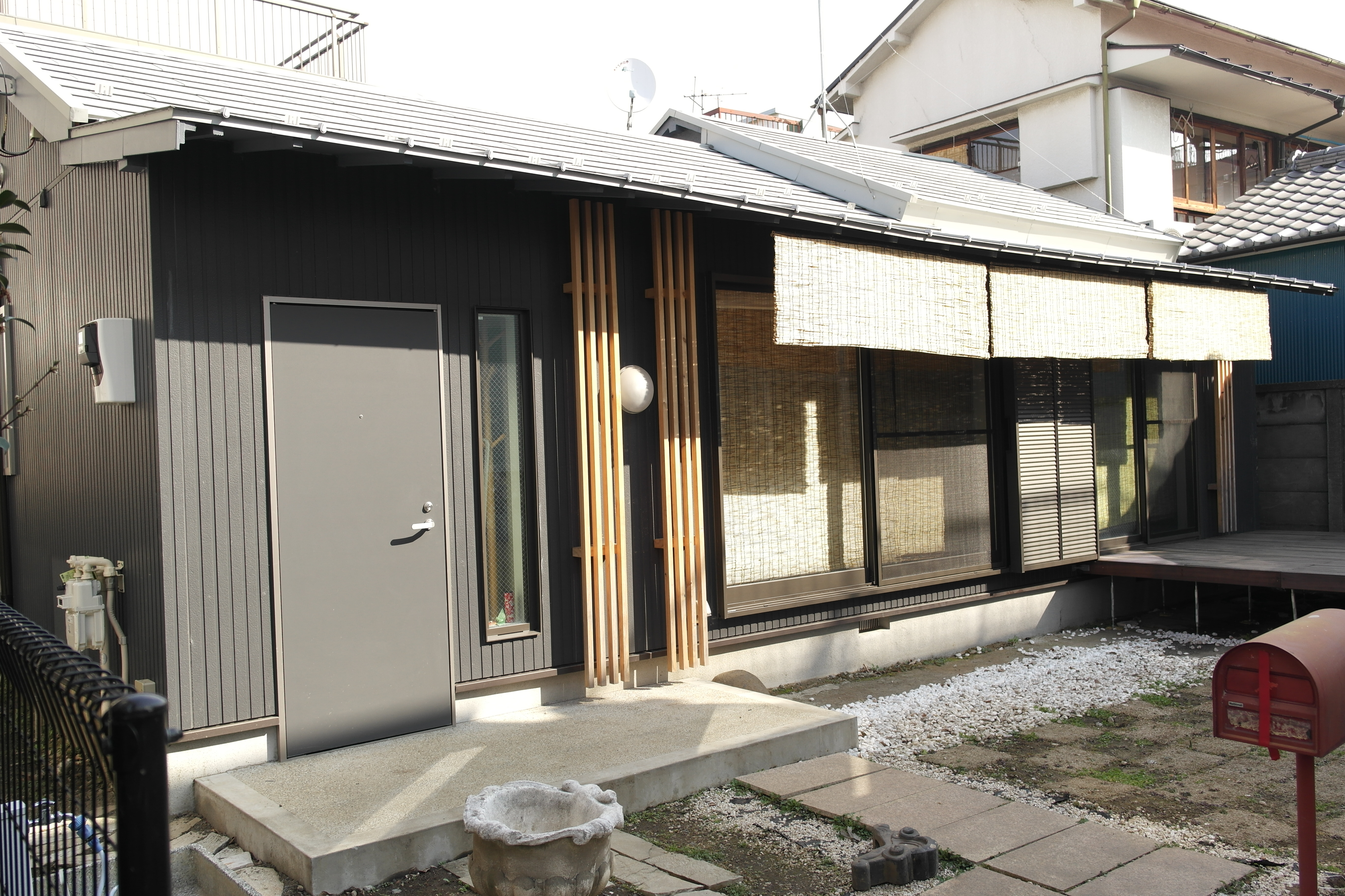 東京都大田区が認可した民泊第一号となるSJヴィラ蒲田A。築60年の古民家をリノベーションして一軒貸しする。背後の二階家屋は無関係。